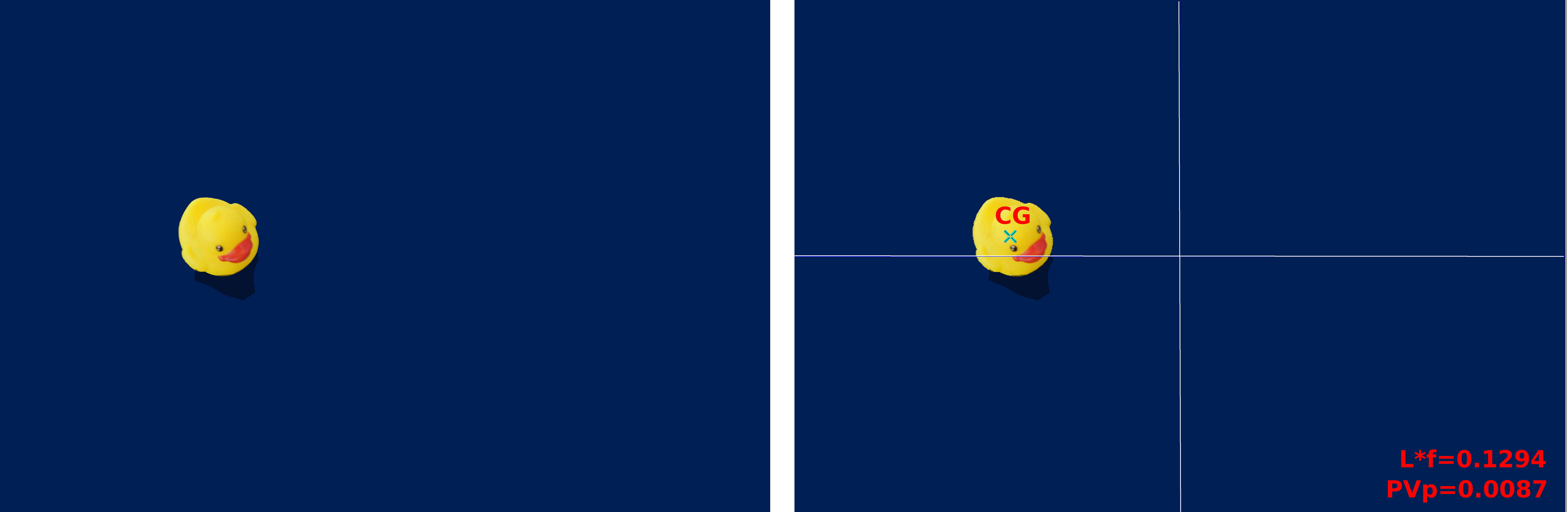 PATO PV